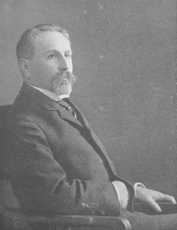 Александр Васильевич Кривошеин, член Государственного Совета.